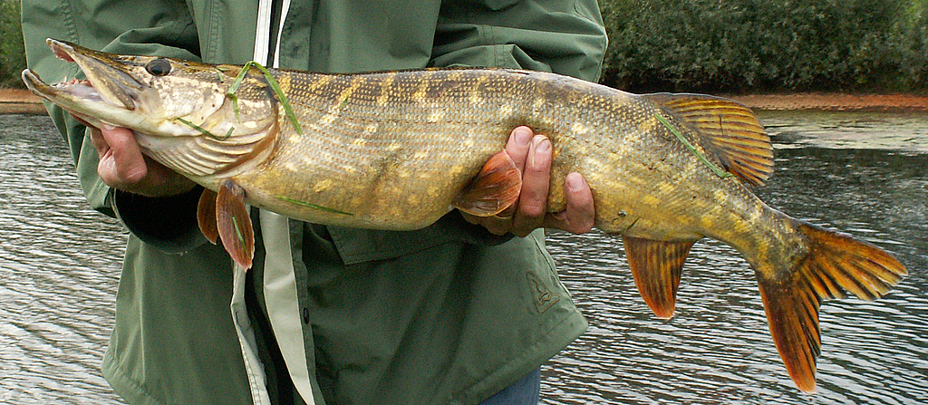 80 cm pike